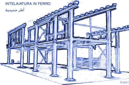 أطر حديدية - INTELAIATURA IN FERRO